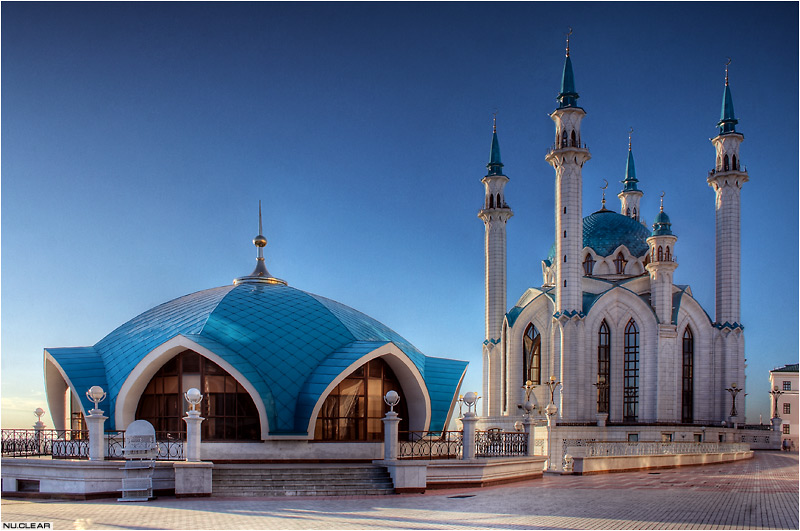 Inside the Kazan Kremlin